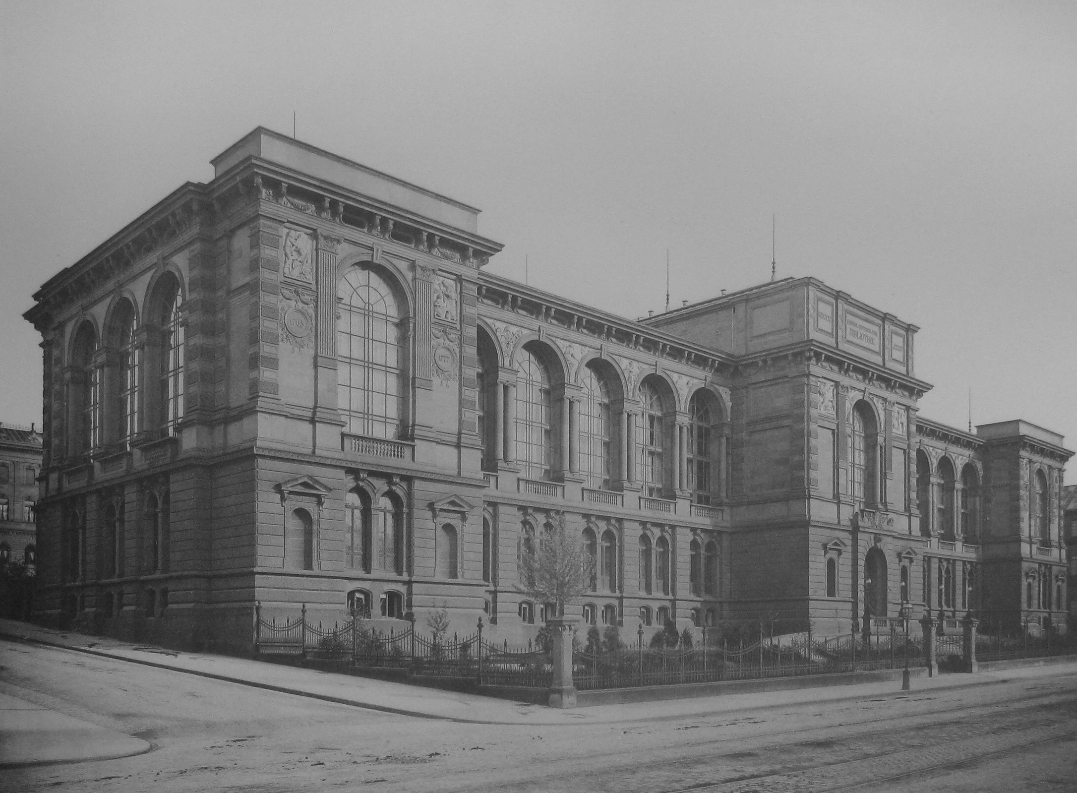 Theodor von Landauer: Stuttgart, Königliche Landesbibliothek (an der Stelle der heutigen Württembergischen Landesbibliothek), Bauzeit 1878–1883, im Zweiten Weltkrieg teilweise zerstört, später abgerissen und durch einen Neubau ersetzt.